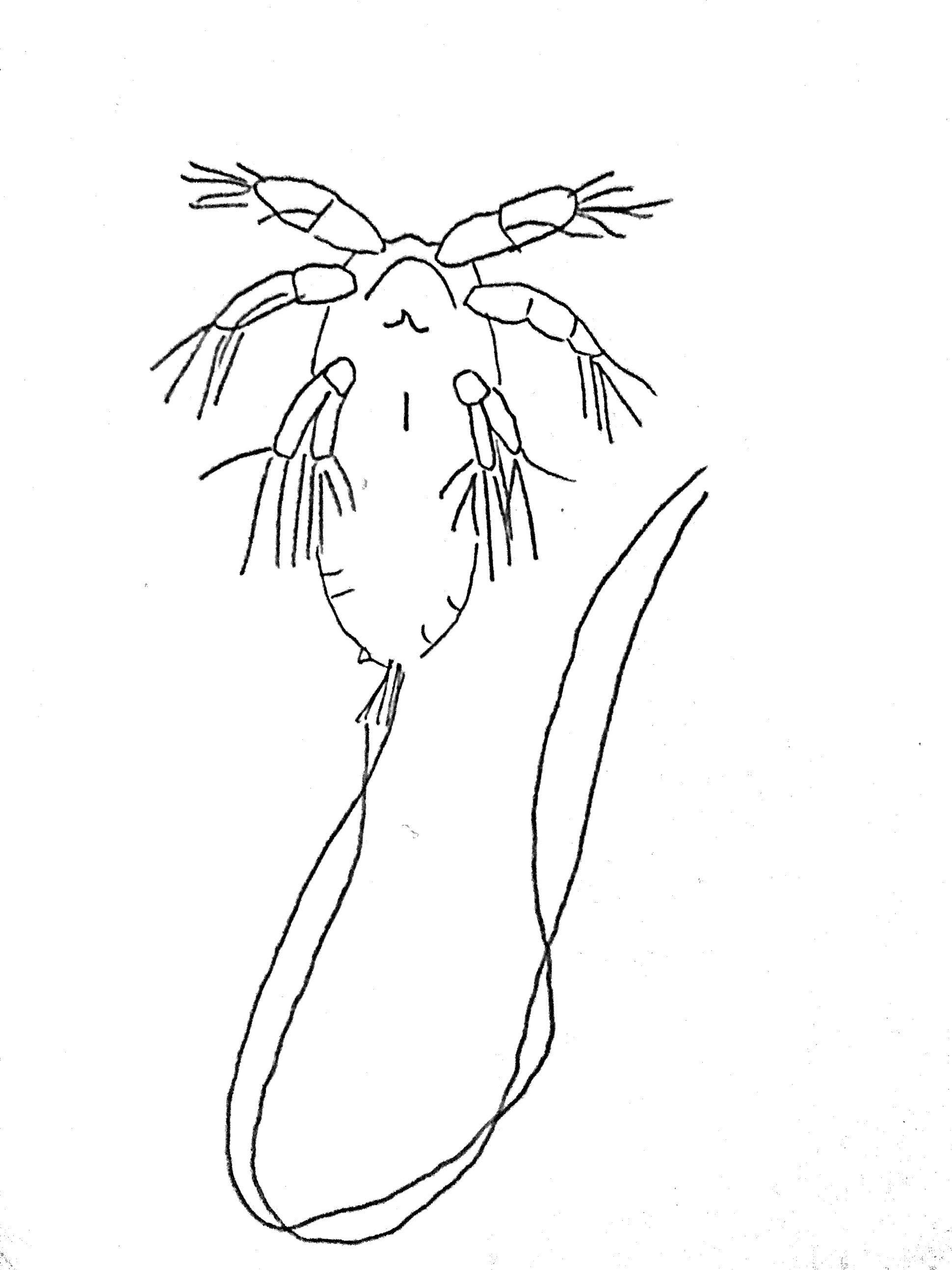 Larva Nauplio Calanoida